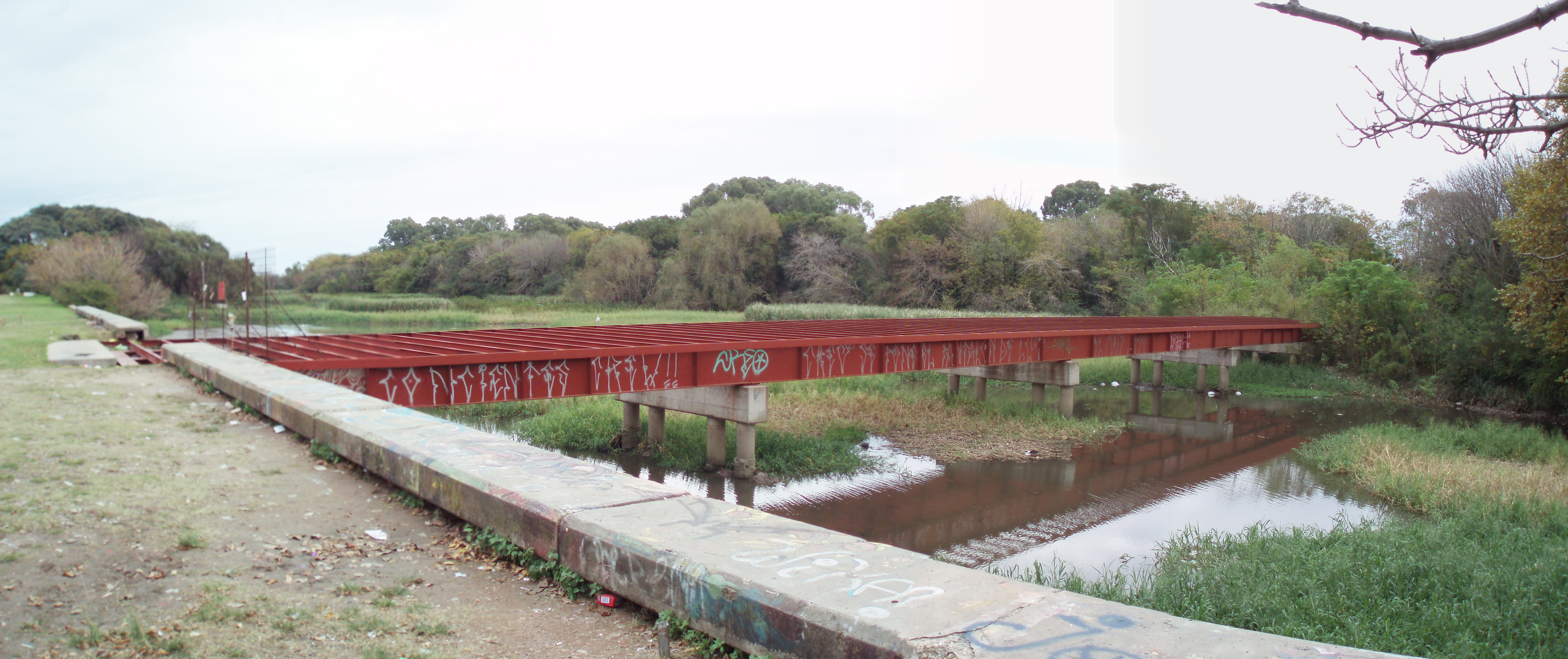 Puente Rojo en la Ciudad Universitaria de Buenos Aires. Pantano.